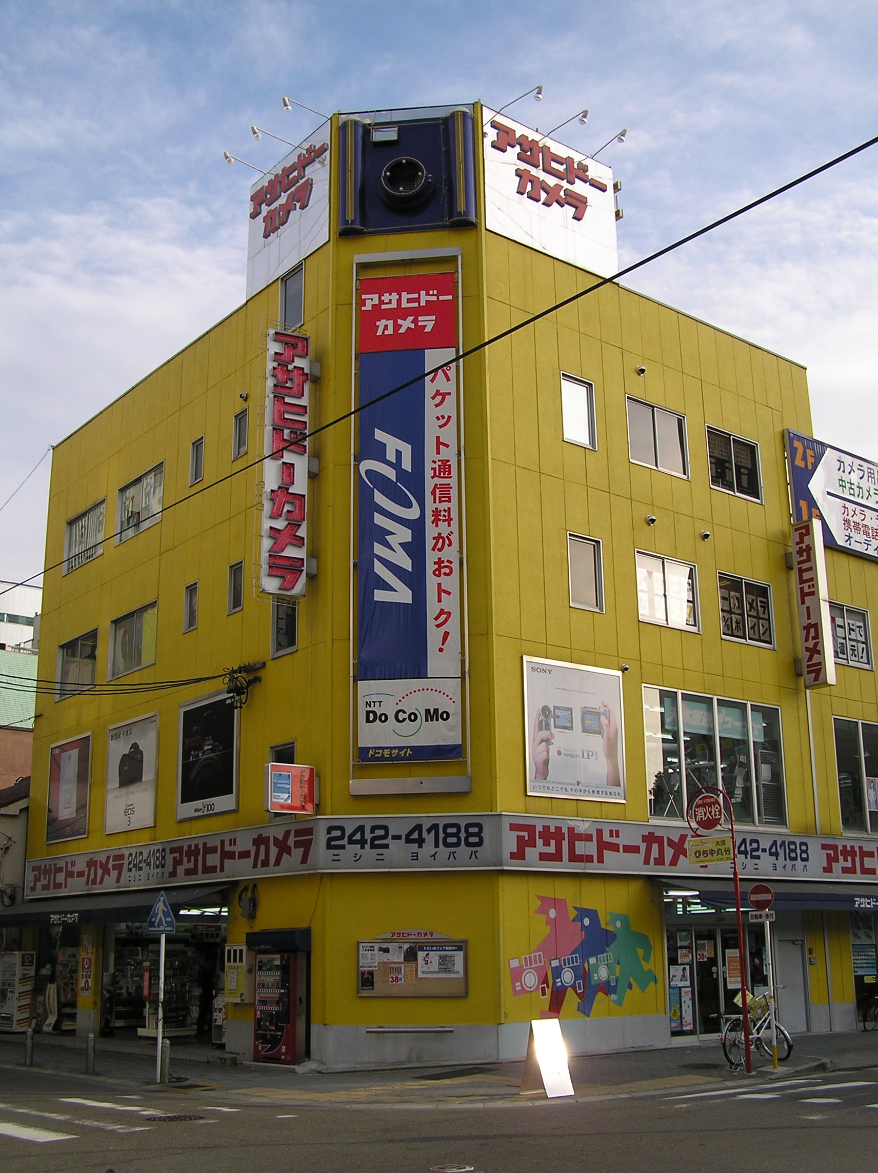 矢場公園前の歩道からアサヒドーカメラ名古屋本店を写す。2004年12月ごろ撮影。